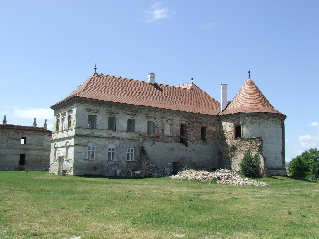 Banffy Castle in Bonţida, Cluj County, Romania